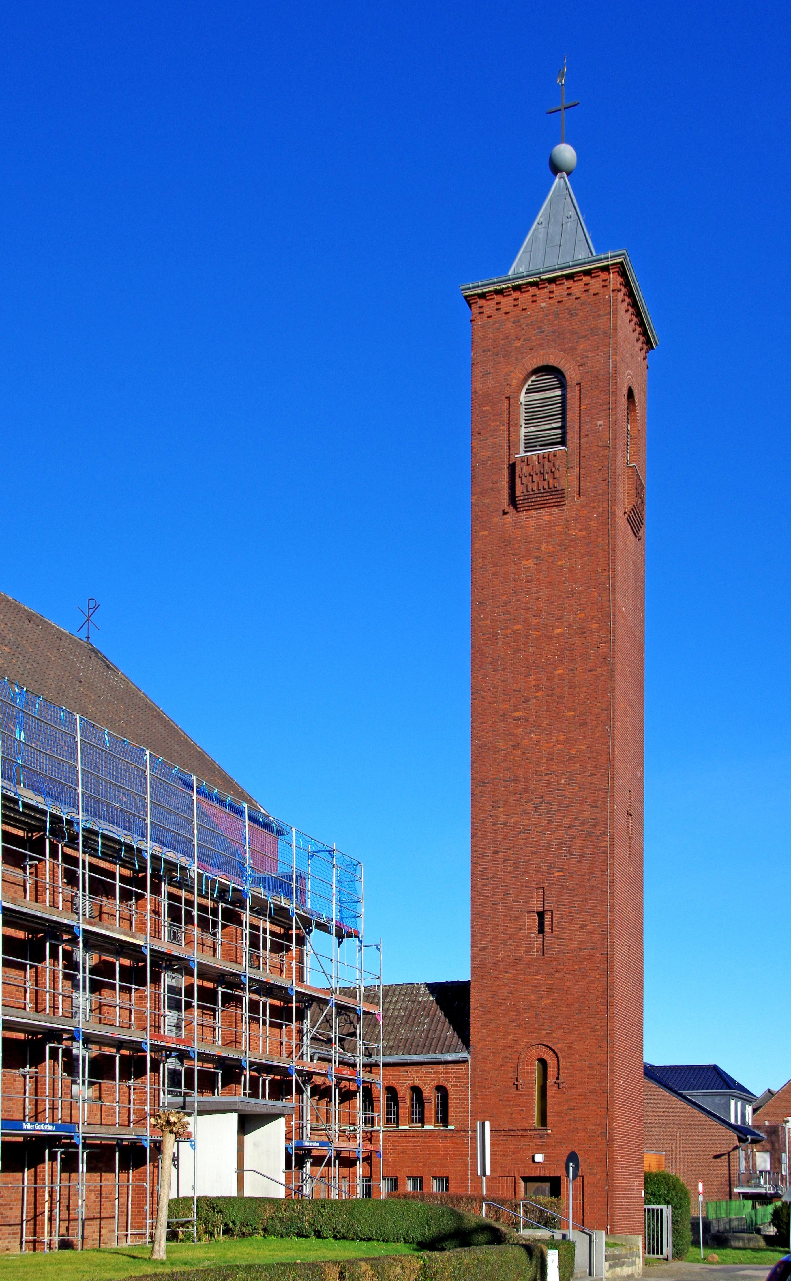 St. Mariä Heimsuchung (Schaufenberg)